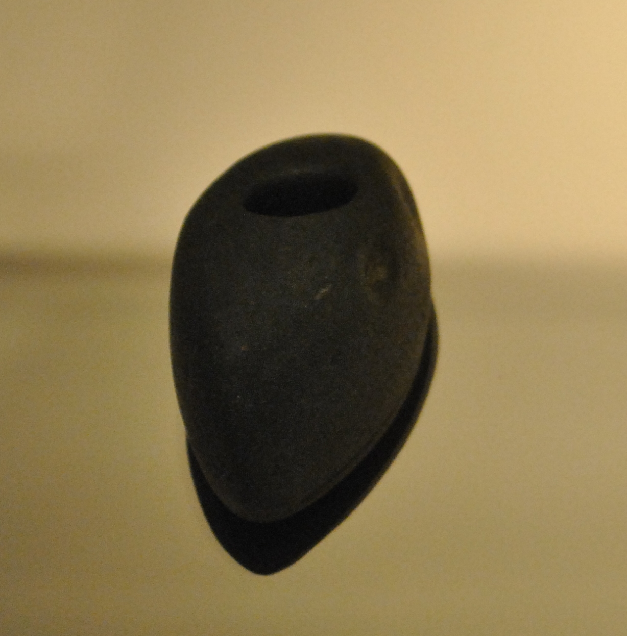 Streitaxt, Volkach, 2800-2000 v. Chr., 1968 bei Baggerarbeiten im Main entdeckt.